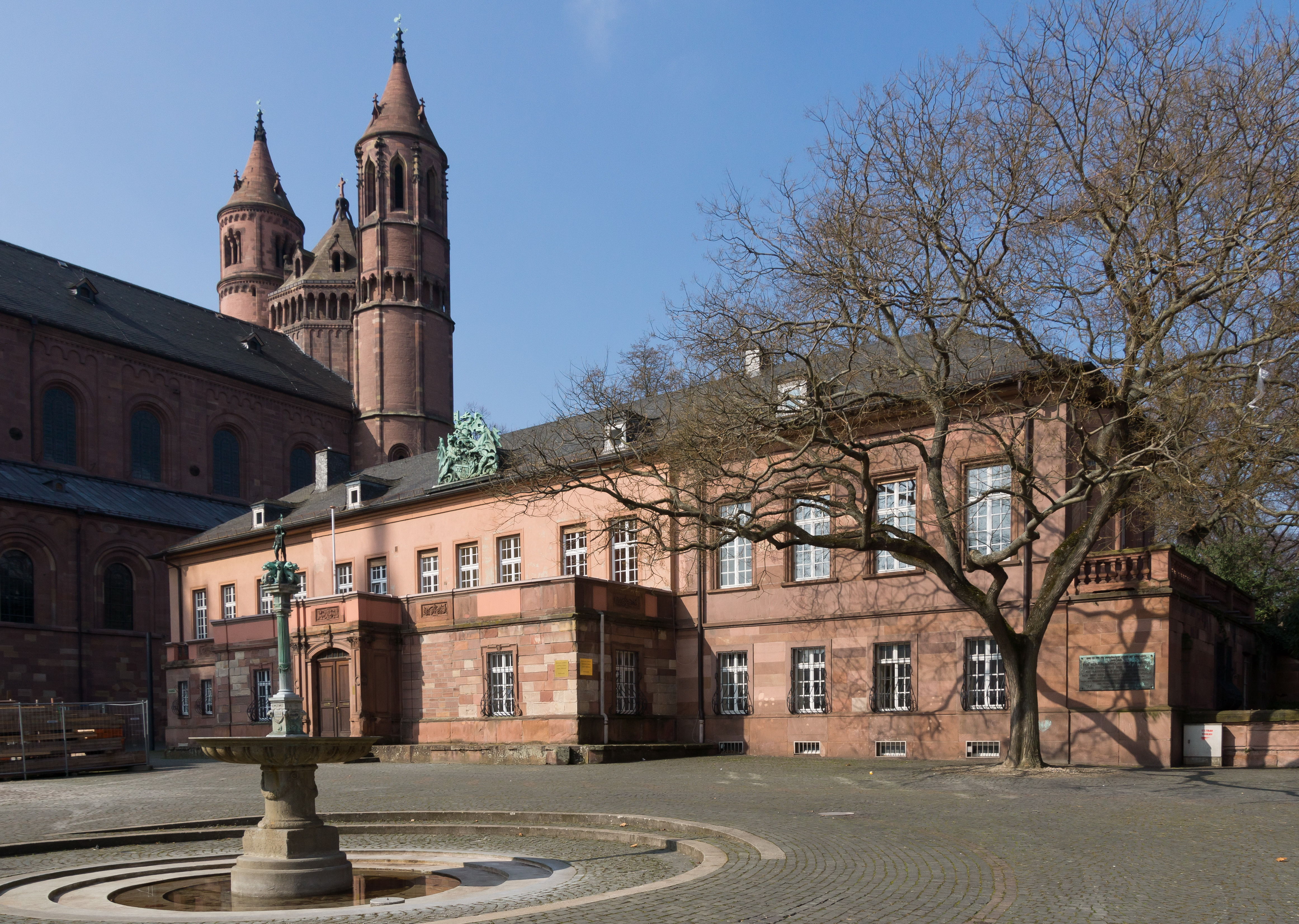 Worms, Heyls Schlößchen, Schloßplatz 1, kleines Stadtpalais, 1843, repräsentativer klassizistischer Ausbau 1851, neubarocker Umbau mit Mansarddach 1905, Architekt Bruno Paul, nach Kriegszerstörung vereinfachte Wiederherstellung, Architekt Heiner Saxer; aufwändiges Familienwappen von Heyl, 1883